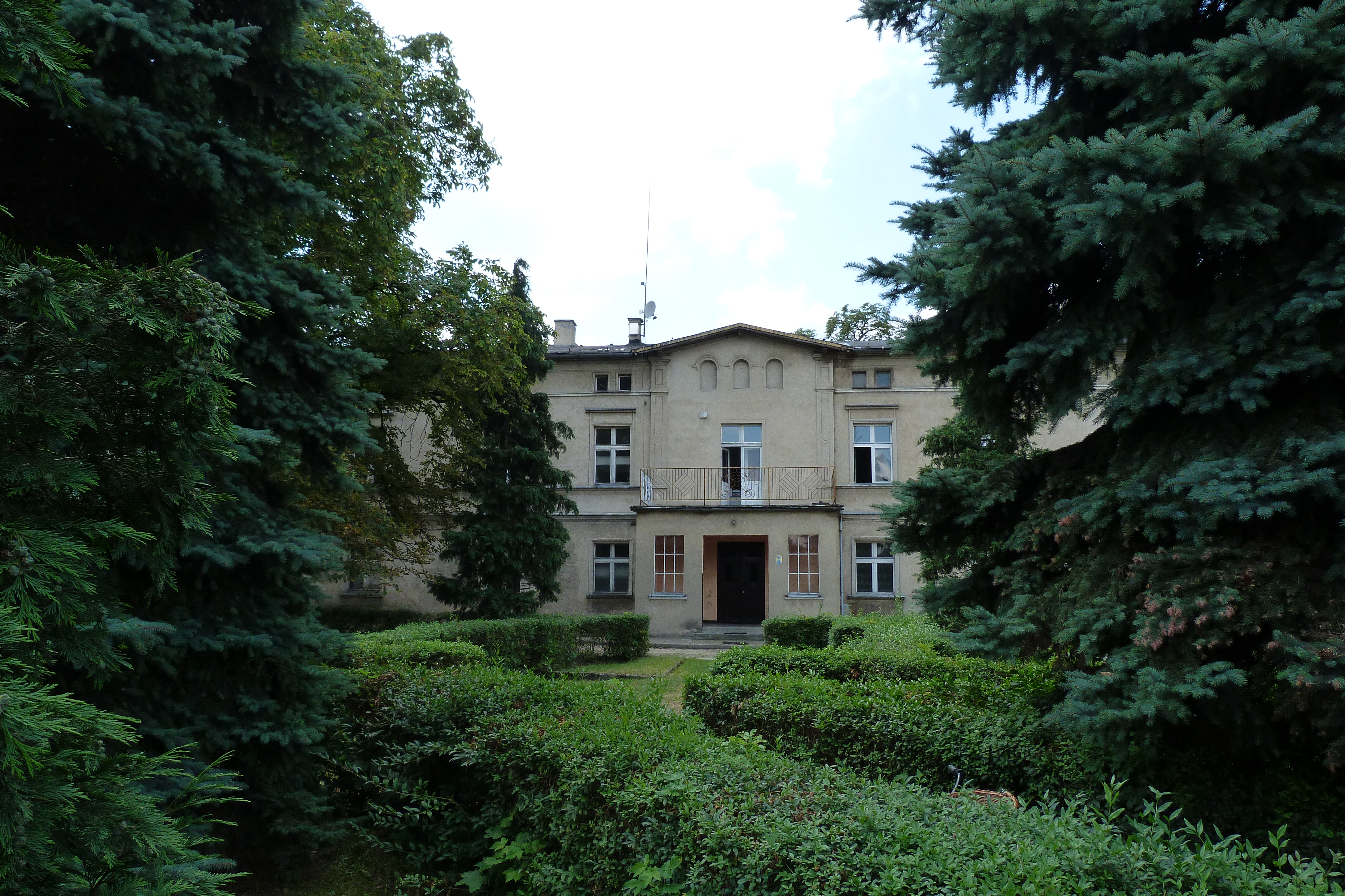 Dwór z XIX w. wybudowany przez Georga Herrmanna, zarządcy folwarku należącego do klucza rydzyńskiego rodziny Sułkowskich